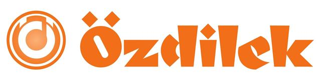 ozdilek logo